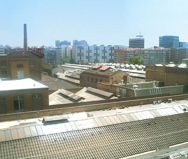 Can Batlló (la Bordeta, Barcelona)